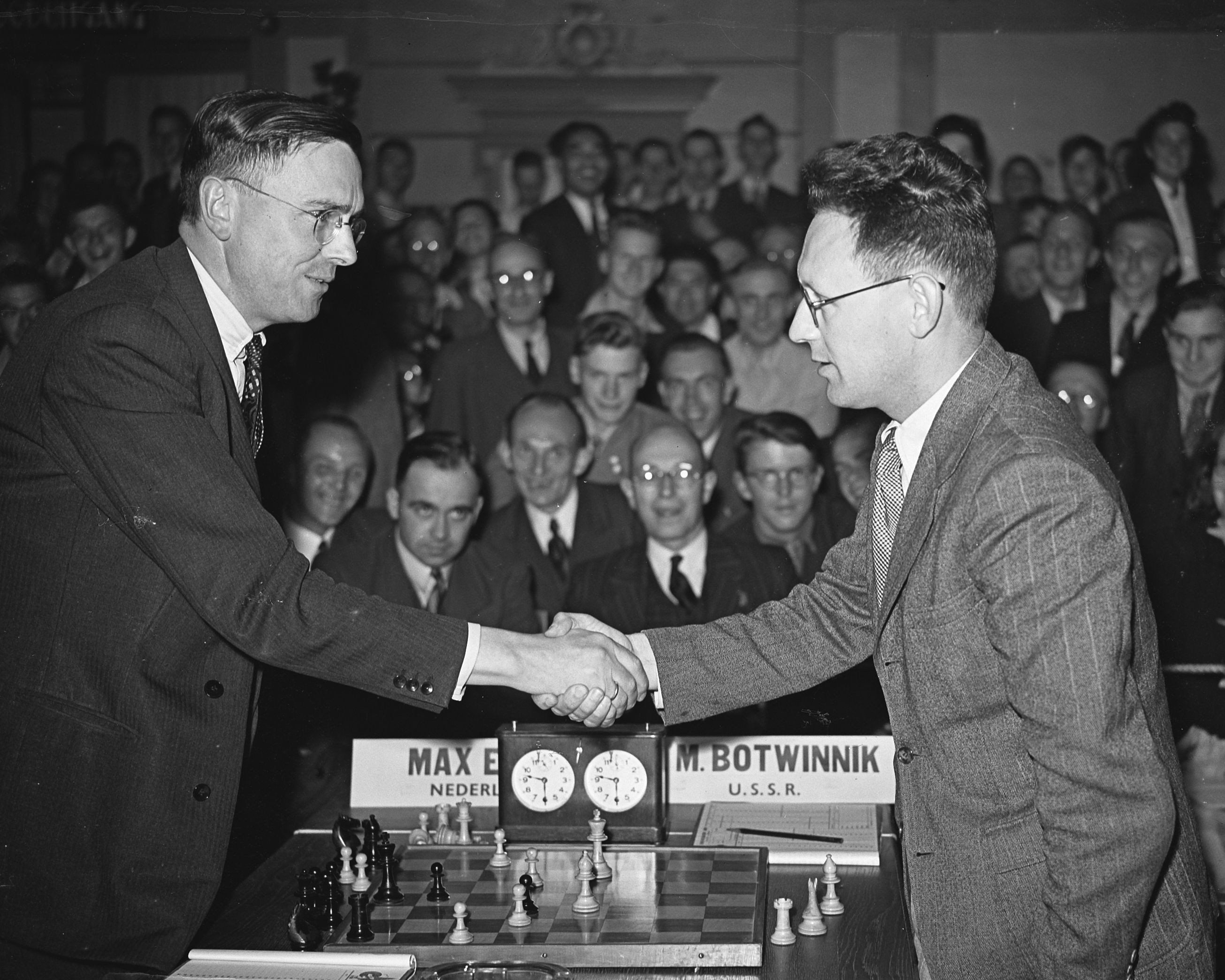 Staunton schaaktoernooi in Groningen (Hotel Frigge); Euwe & Botwinnik. 24 augustus 1946